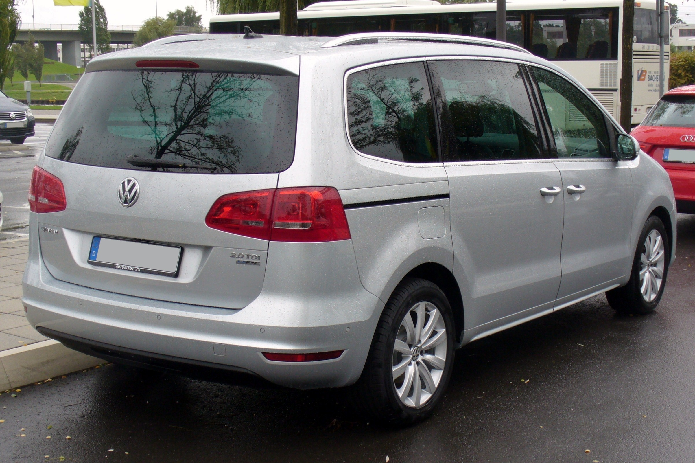 VW Sharan II